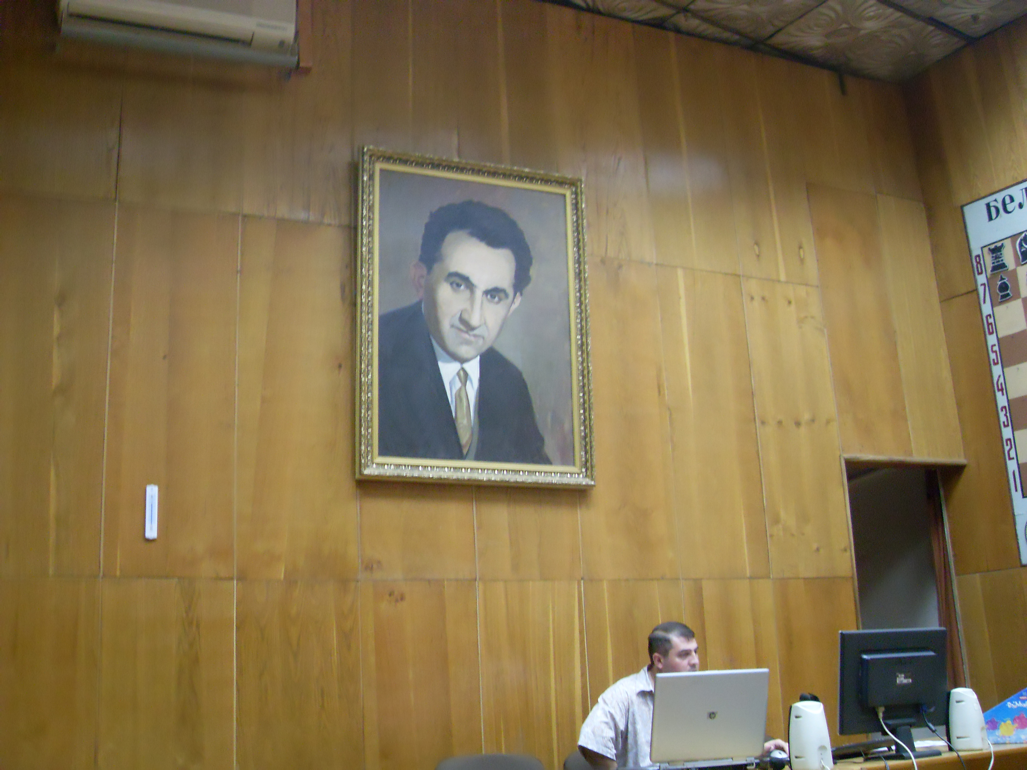 Տիգրան Պետրոսյանի անվան Շախմատիստի կենտրոնական տուն, Երևան, 1970, ճարտ.` Ժ. Մեշչերյակովա 6/151